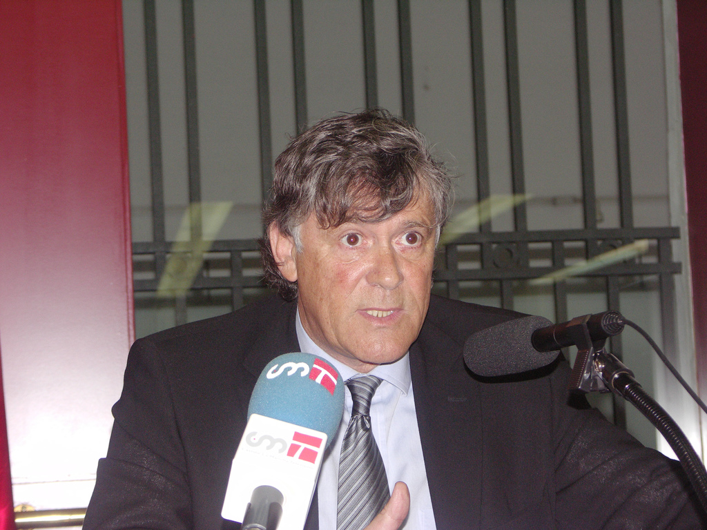 Simon Casas (Bernard Dombs)